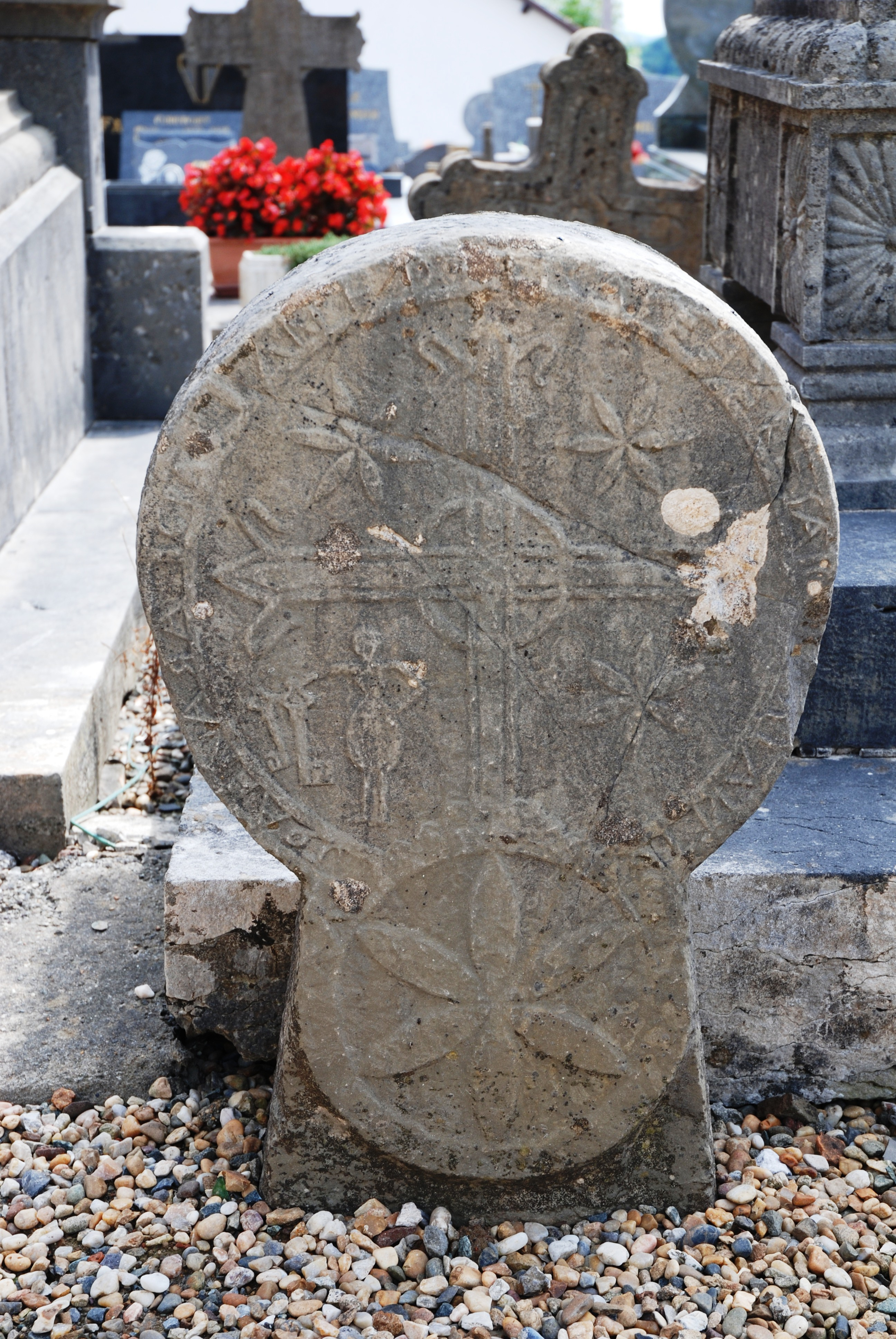 Orègue, stèle basque